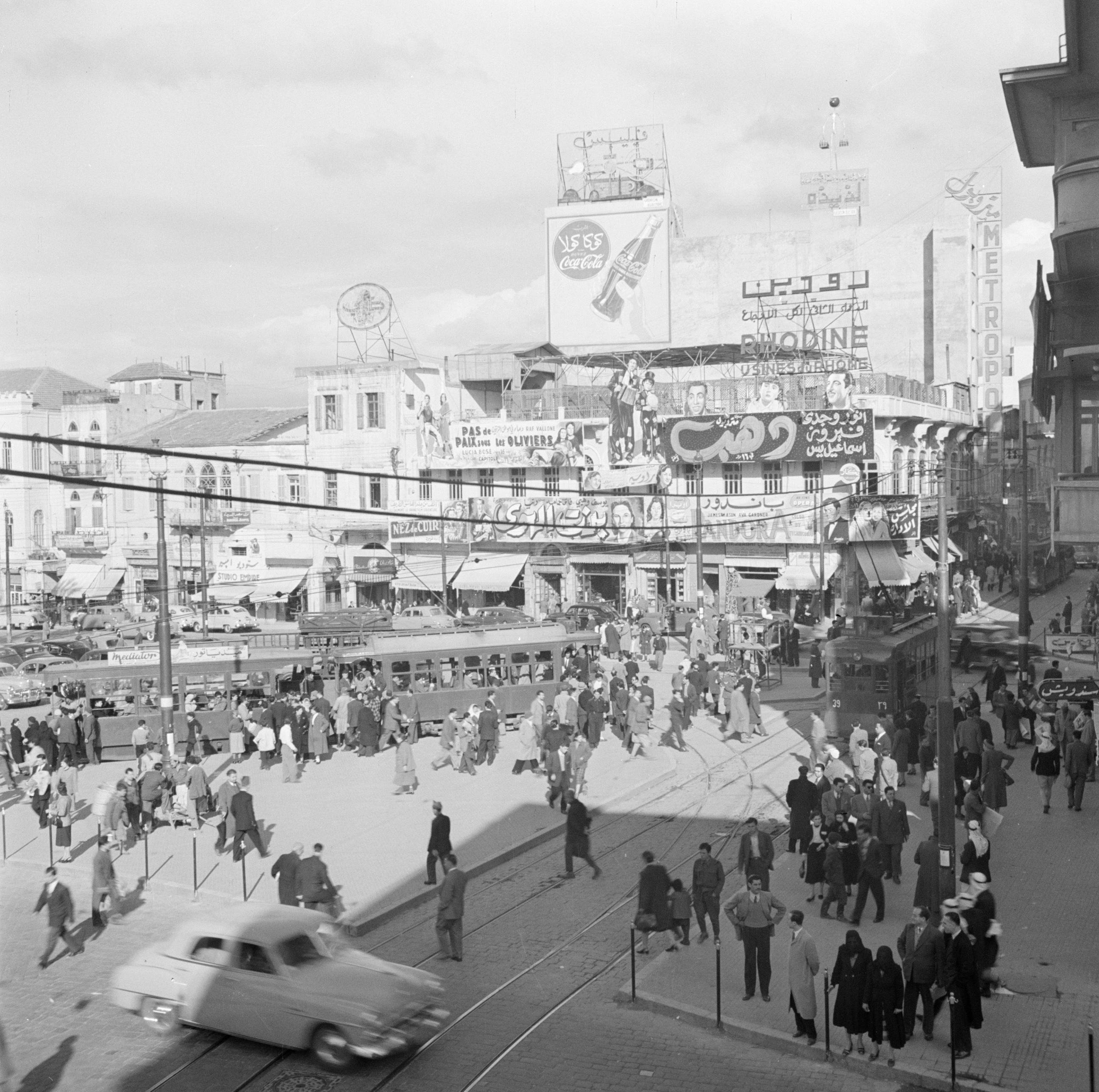 Collectie / Archief : Fotocollectie Van de Poll Reportage / Serie : Midden-Oosten 1950-1955: Libanon Beschrijving : Straatbeeld in Beiroet Datum : 1950 Locatie : Beiroet, Libanon Trefwoorden : auto's, reclameteksten, straatbeelden, trams, voetgangers Fotograaf : Poll, Willem van de Auteursrechthebbende : Nationaal Archief Materiaalsoort : Negatief (zwart/wit) Nummer archiefinventaris : bekijk toegang 2.24.14.02 Bestanddeelnummer : 255-6182